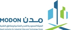 علم الهيئة السعودية للمدن الصناعية ومناطق التقنية